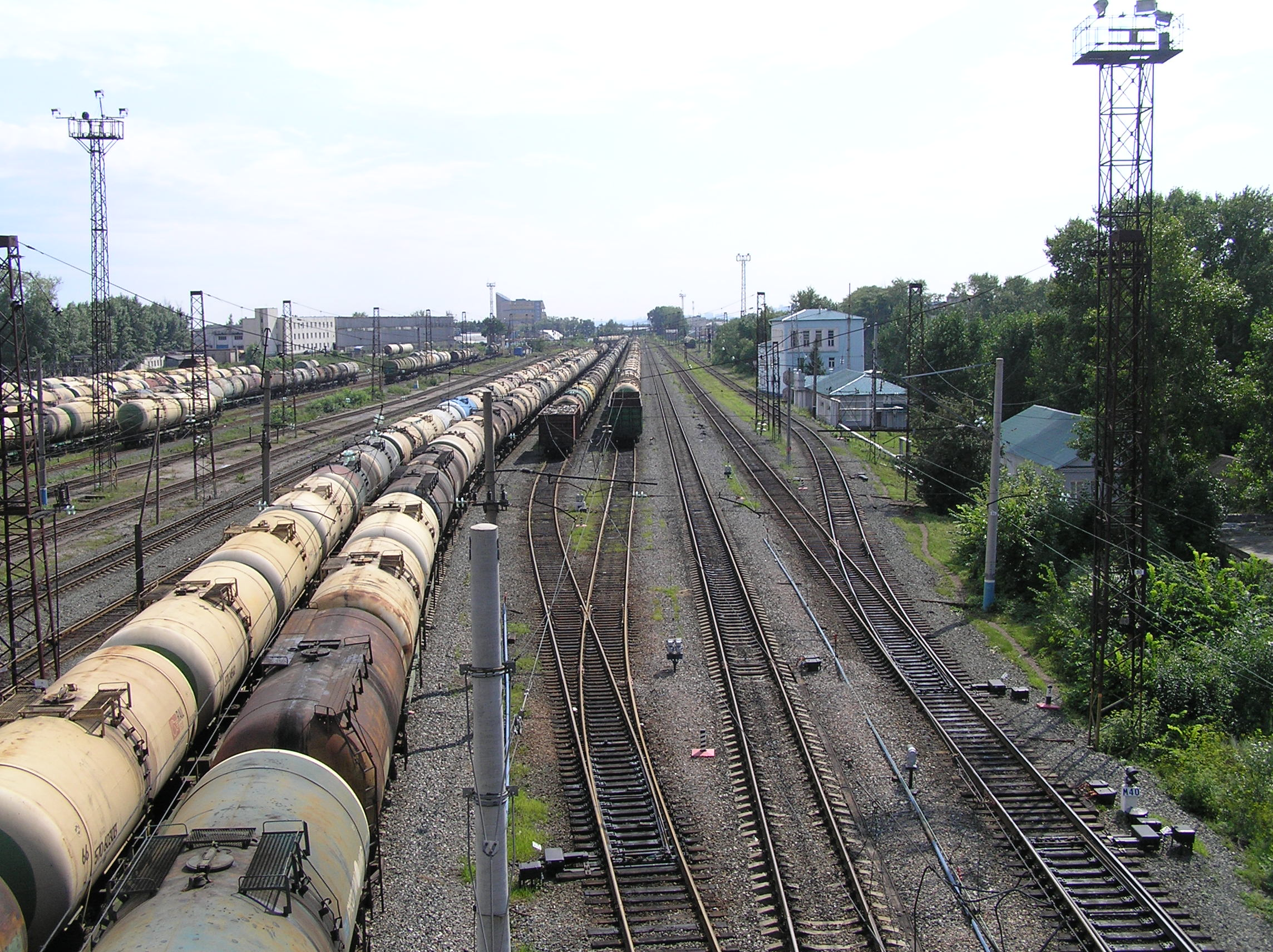 ст. Бензин, Куйбышевская ж.д., г. Уфа